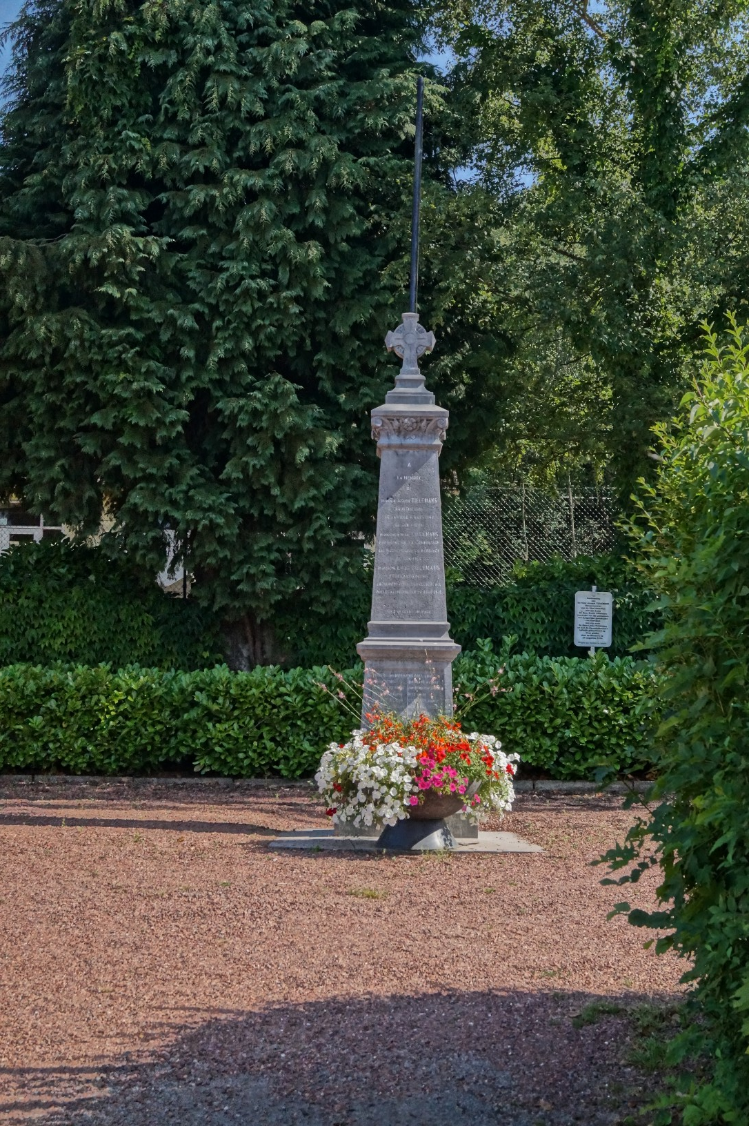 Herdenking aan de slachtoffers van de Duitse represailles in Aarschot in augustus 1914.